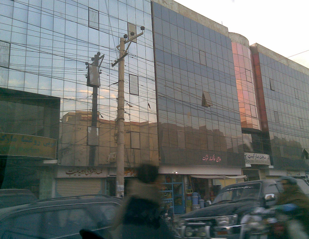 Buildings in Kandahar.